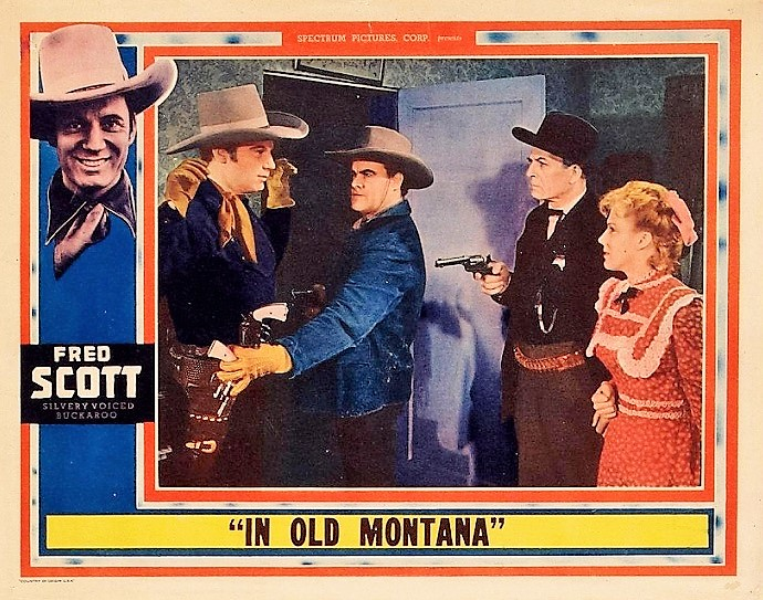 Poster del film In Old Montana